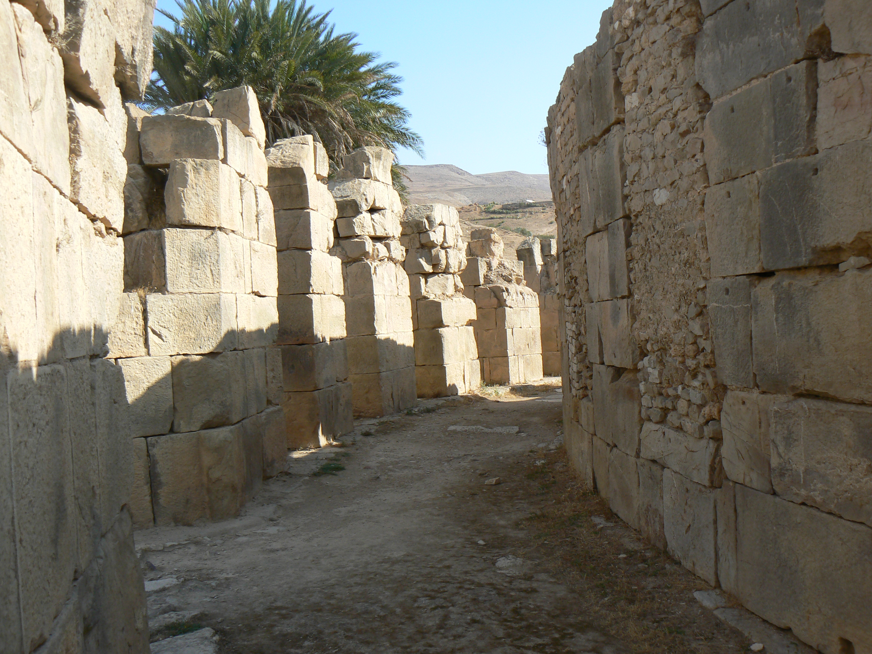 arcades du théâtre de Bulla Regia, Tunisie